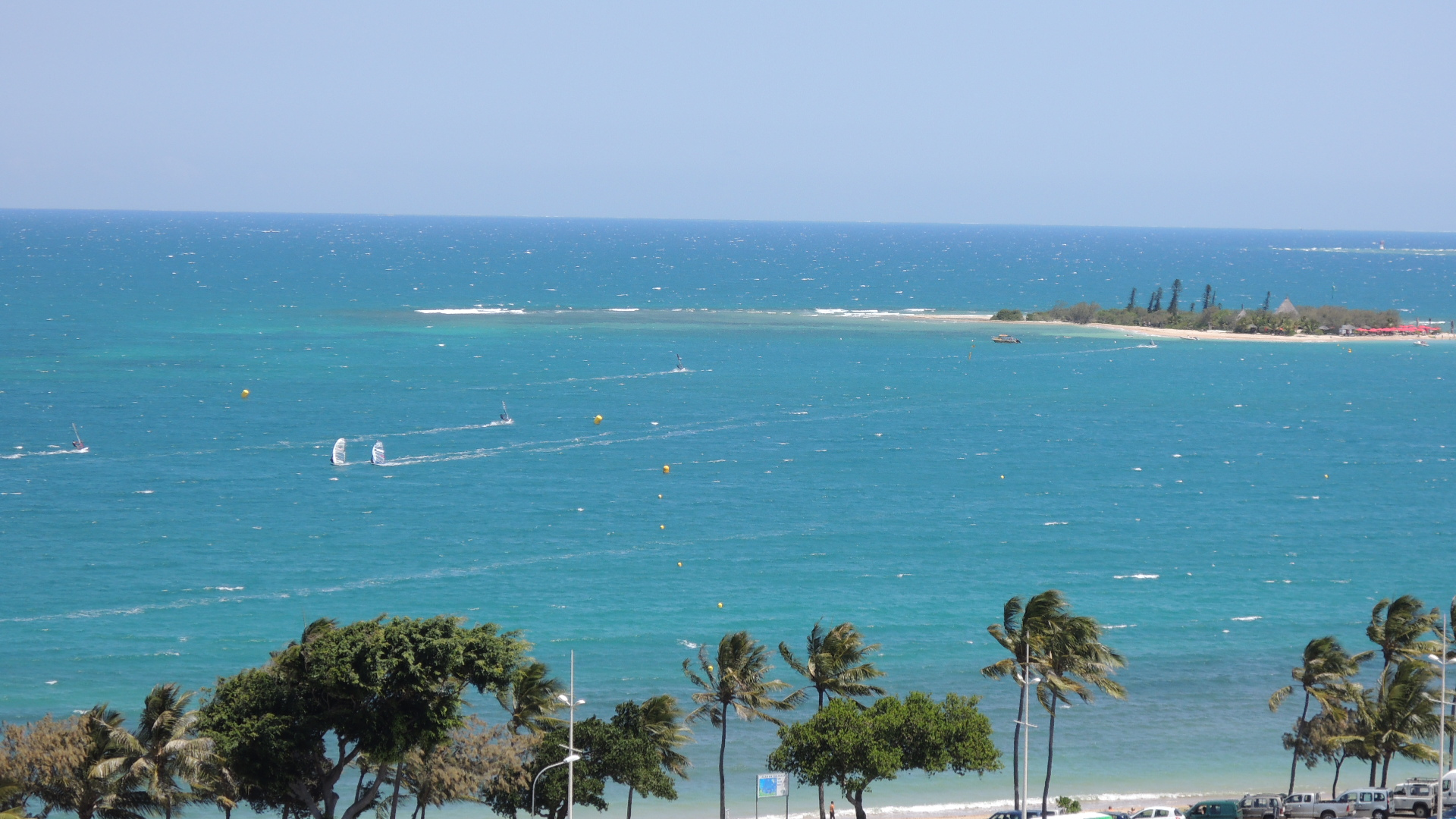 Vue sur la baie de l'Anse Vata